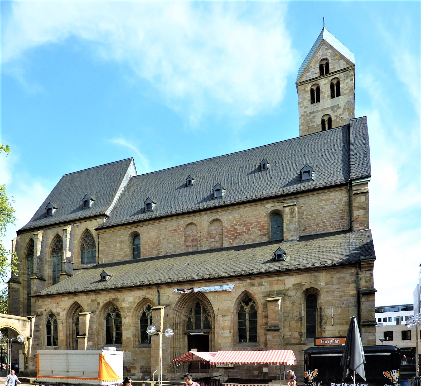 Marienkirche (Dortmund)